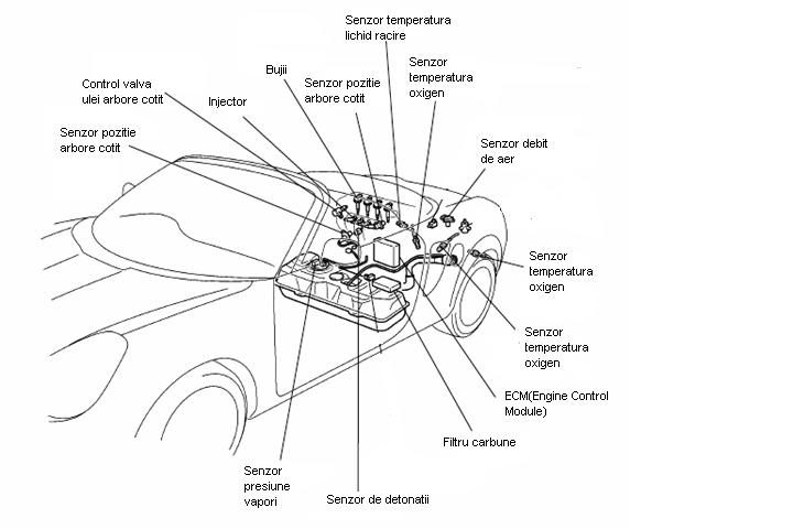 Senzori distribuiti automobil